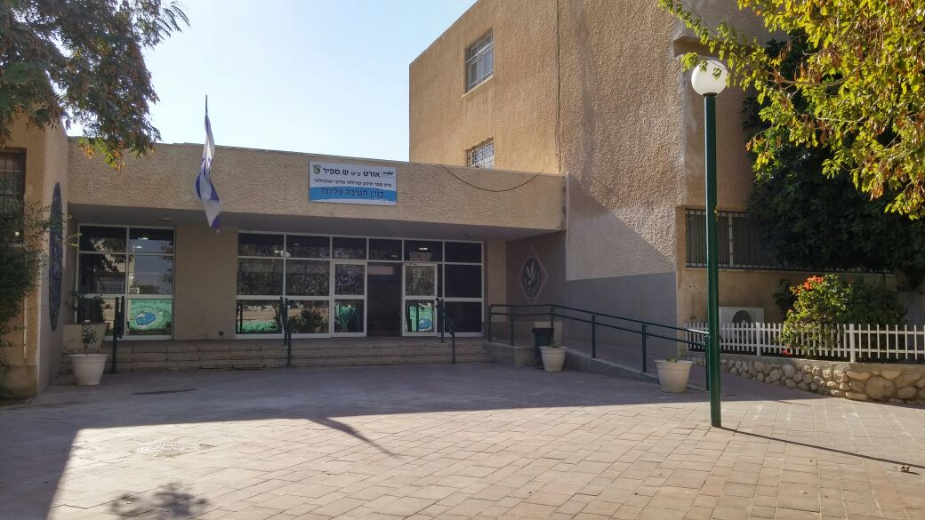 עהןהבלב